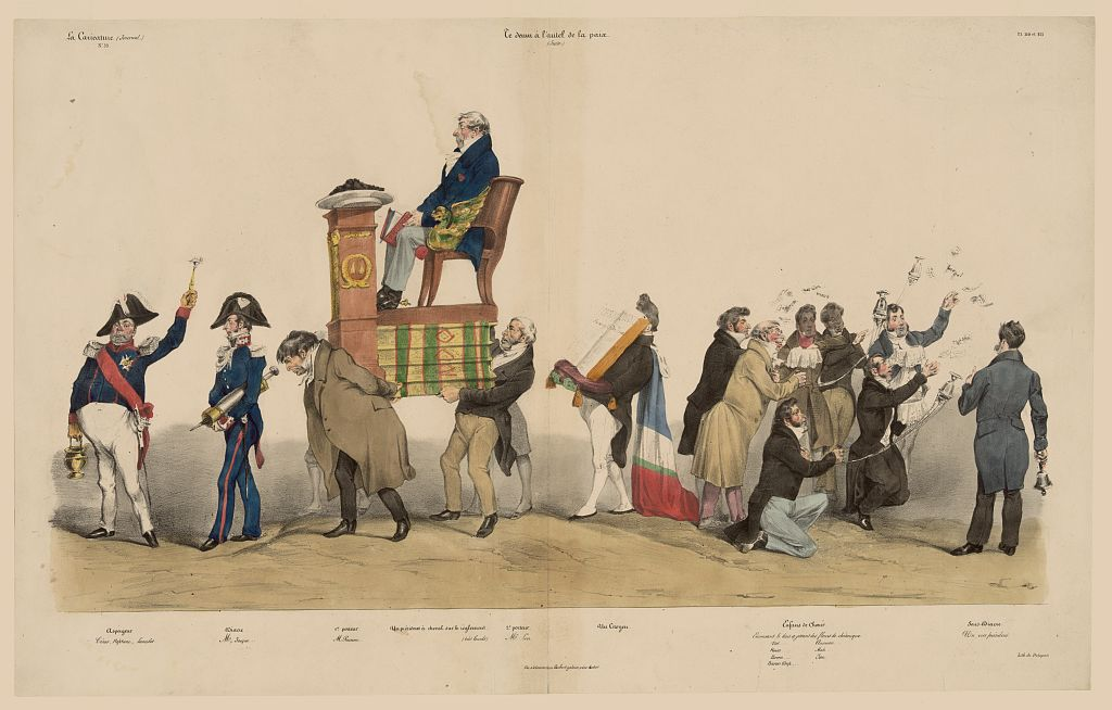 Caricature of French politician Amédée Girod de l'Ain (1781-1847) by Grandville. "Te deum à l'autel de la paix" ("Te Deum at the altar of peace"). Library of Congress description: "Print shows a procession with "Aspergeur" (Le maréchal Mouton), "Diacre" (Jean-Francois Jacqueminot), "Un président à cheval sur le règlement" (Louis-Gaspard-Amédée Girod de l'Ain) sitting in a chair being carried by four porters, "1er porteur" (Clément-François-Victor-Gabriel Prunelle), "2e porteur" (Benjamin-François Levrault), "Un citoyen" (Louis Philippe, King of the French) his face obscured by a large book, "Enfans de Chœur" (Vatout, Kératry, Bérenger, Jars, Mahul, Ganneron), and "Sous-Diacre."Notes:Georges Mouton (1770-1838), generalJean-François Jacqueminot (1787-1865), generalClément-François-Victor-Gabriel Prunelle (1774-1853), politicianBenjamin-François Levrault (1771-1855), politicianAuguste Hilarion Kératry (1769-1859), historian, poet and politicianAlphonse-Marie-Marcellin-Thomas Bérenger (1785-1866), judgeAntoine-Gabriel Jars (1774-1857), politicianAlphonse-Jacques Mahul (1795-1871), lawyer and politiciannAuguste-Victor-Hippolyte Ganneron (1792-1847) industrialist and politicianJean Vatout (1792-1848), historian and politician.